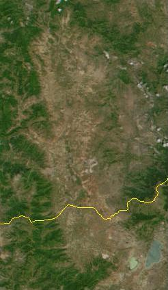 Котловината Пелагония. Държавната граница между Република Македония и Гърция е в жълто.